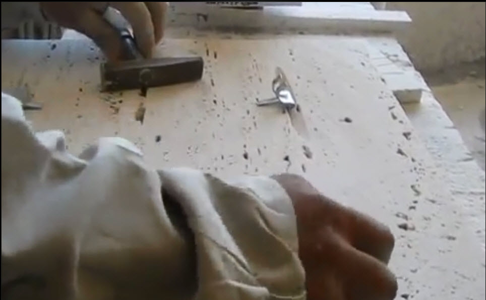 نصب اسکوپ بر پشت سنگ نما